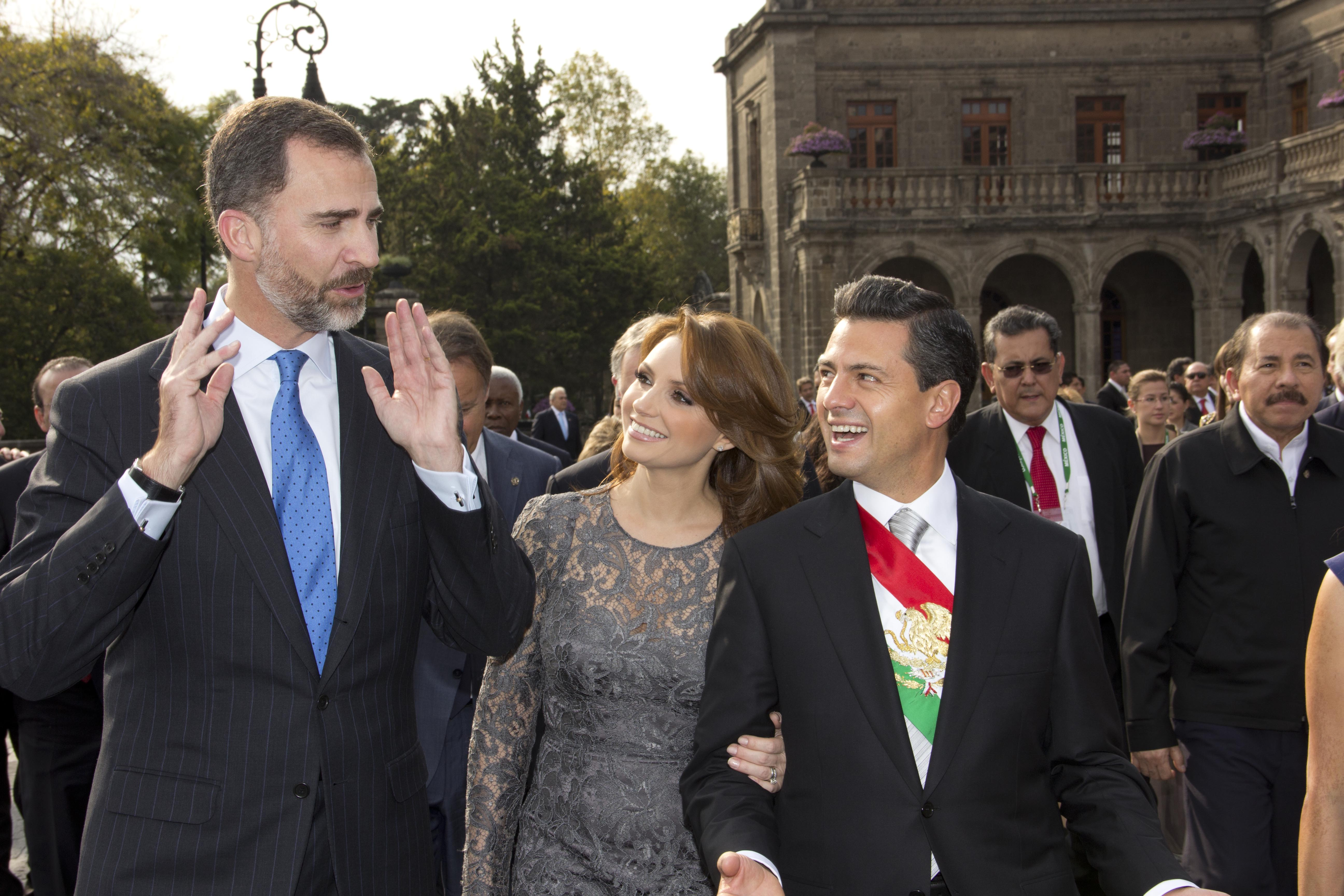 Comida con Jefes de Estado. México, D.F. 1 de diciembre de 2012